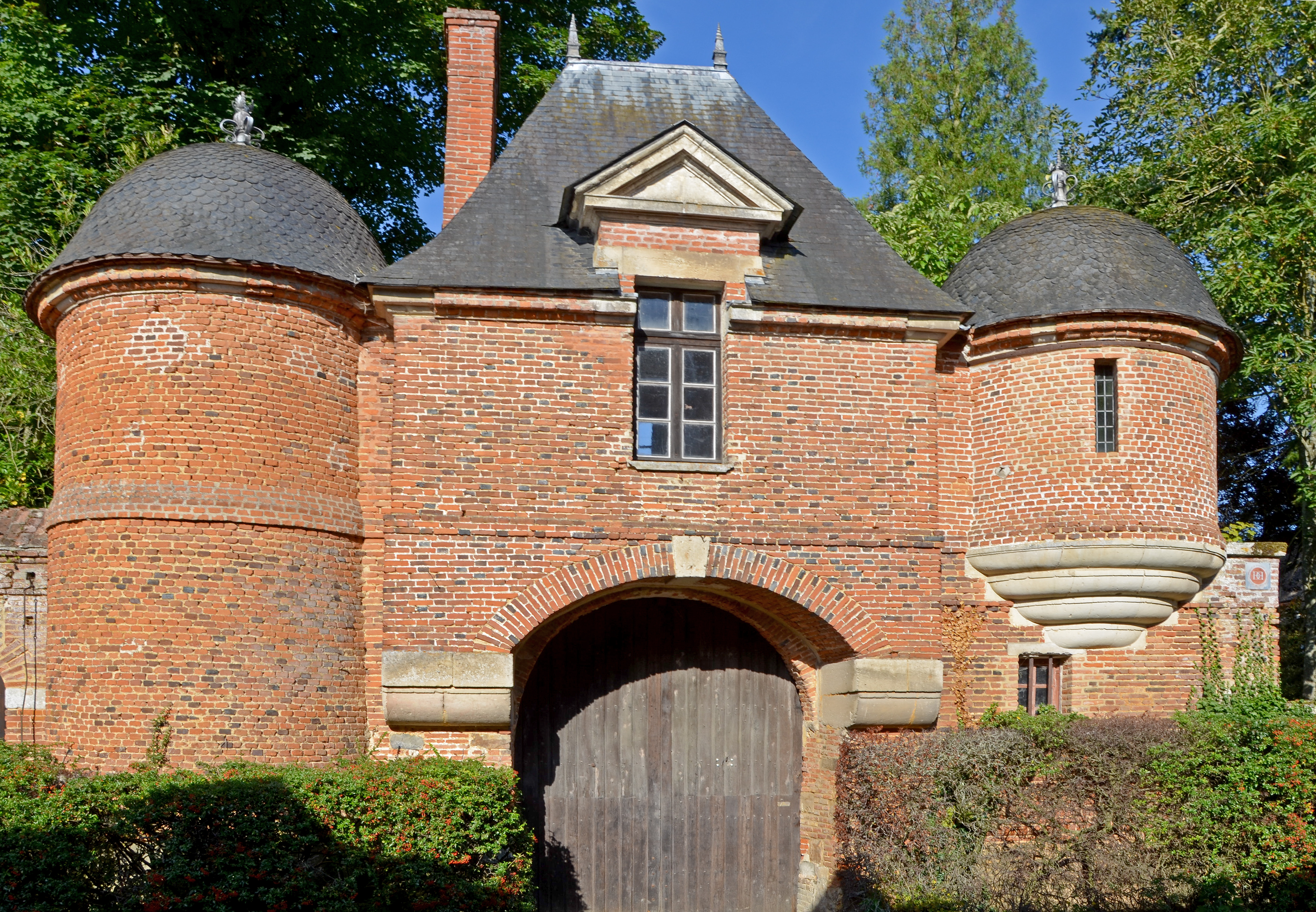 Porche de l'entrée du manoir de Montalègre, Eure, Normandie, France